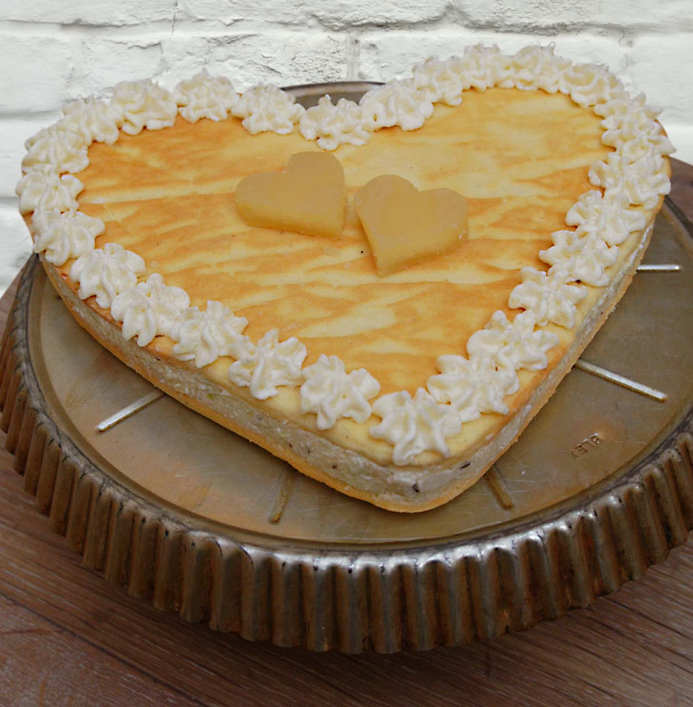 Dort z tvarůžků ve tvaru srdce